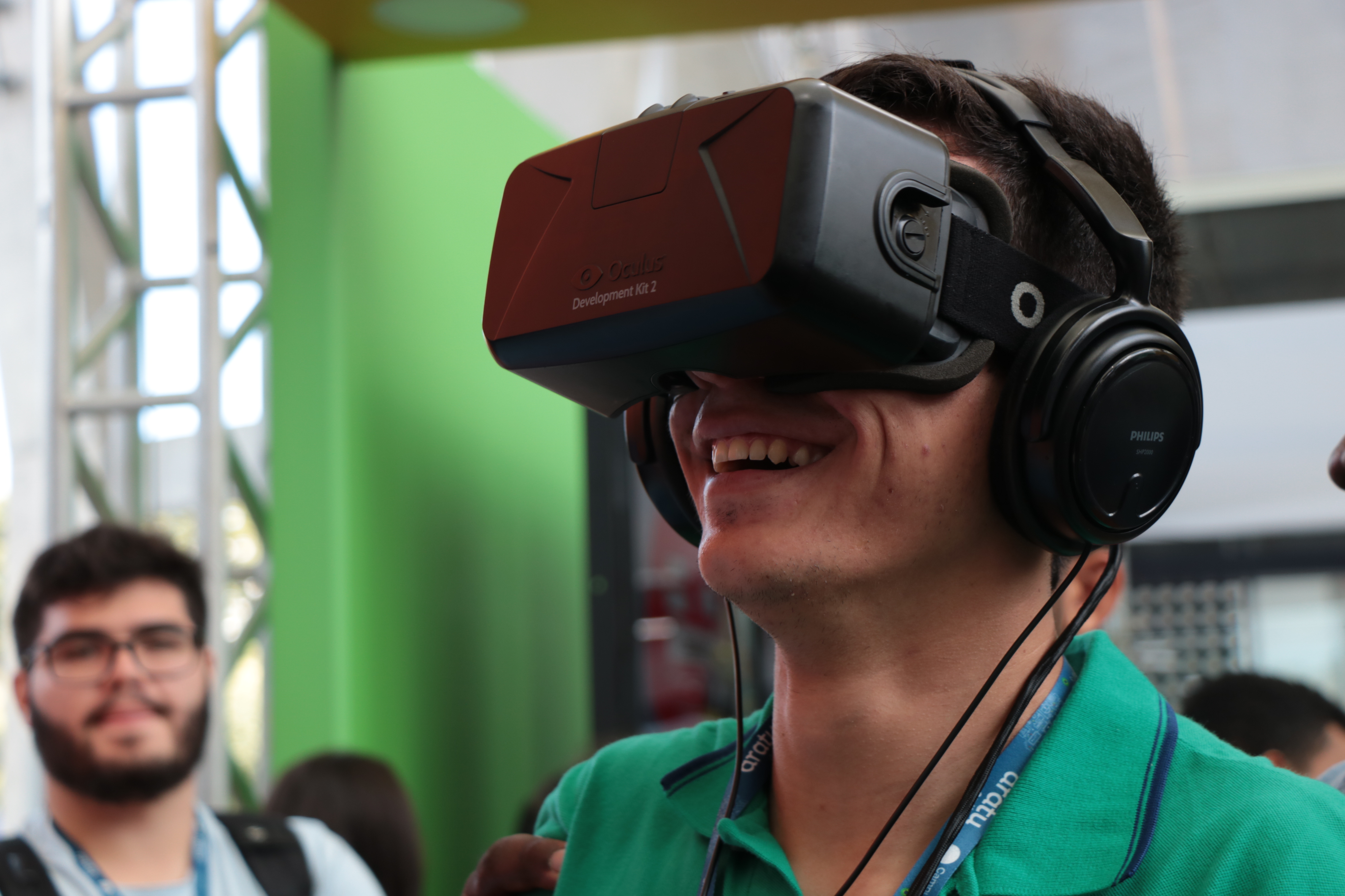 Campus Party Bahia